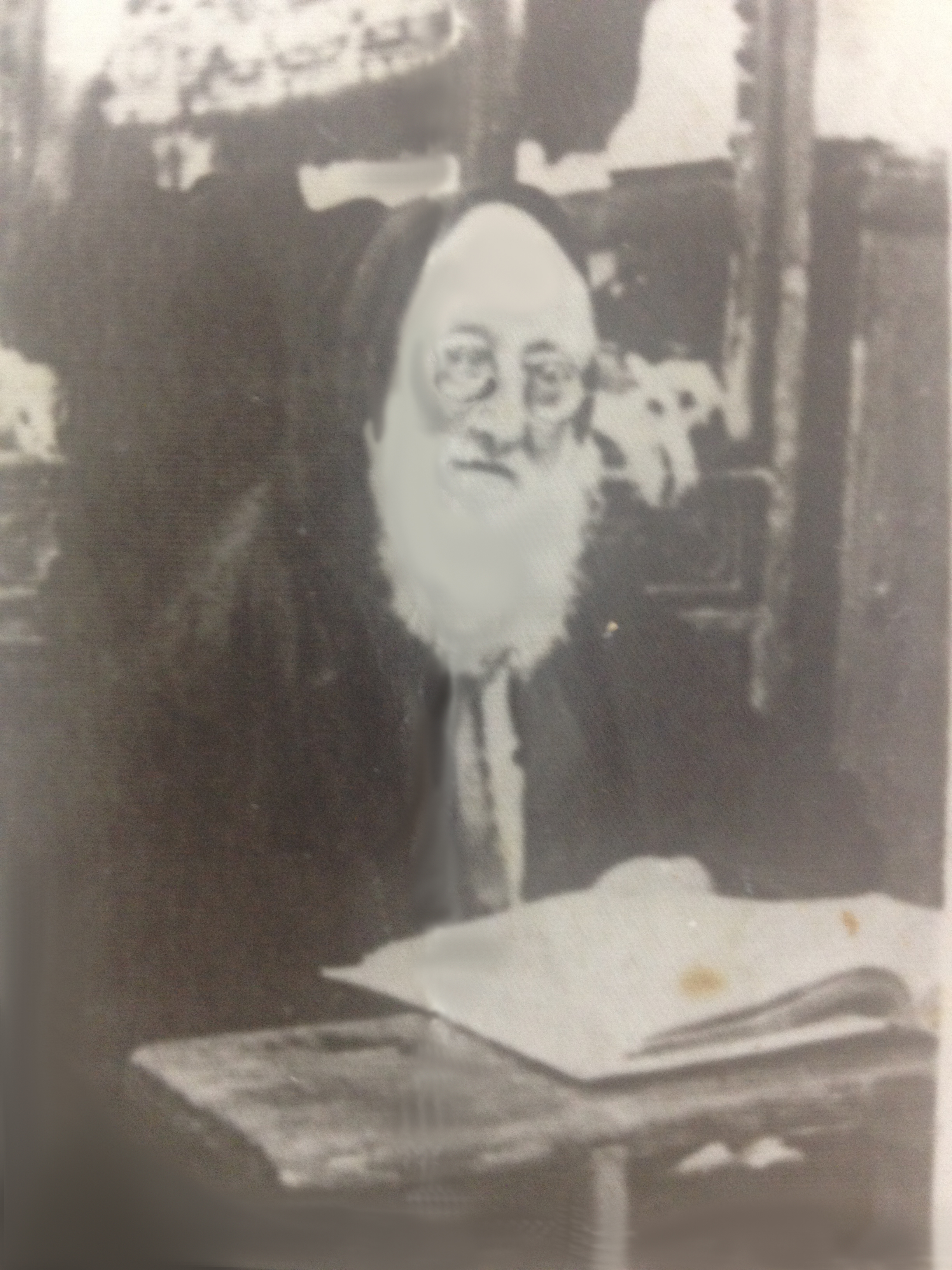 ר' יוסף אלקובי בישיבה